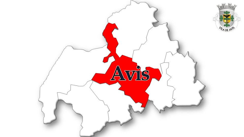 Evolução da População